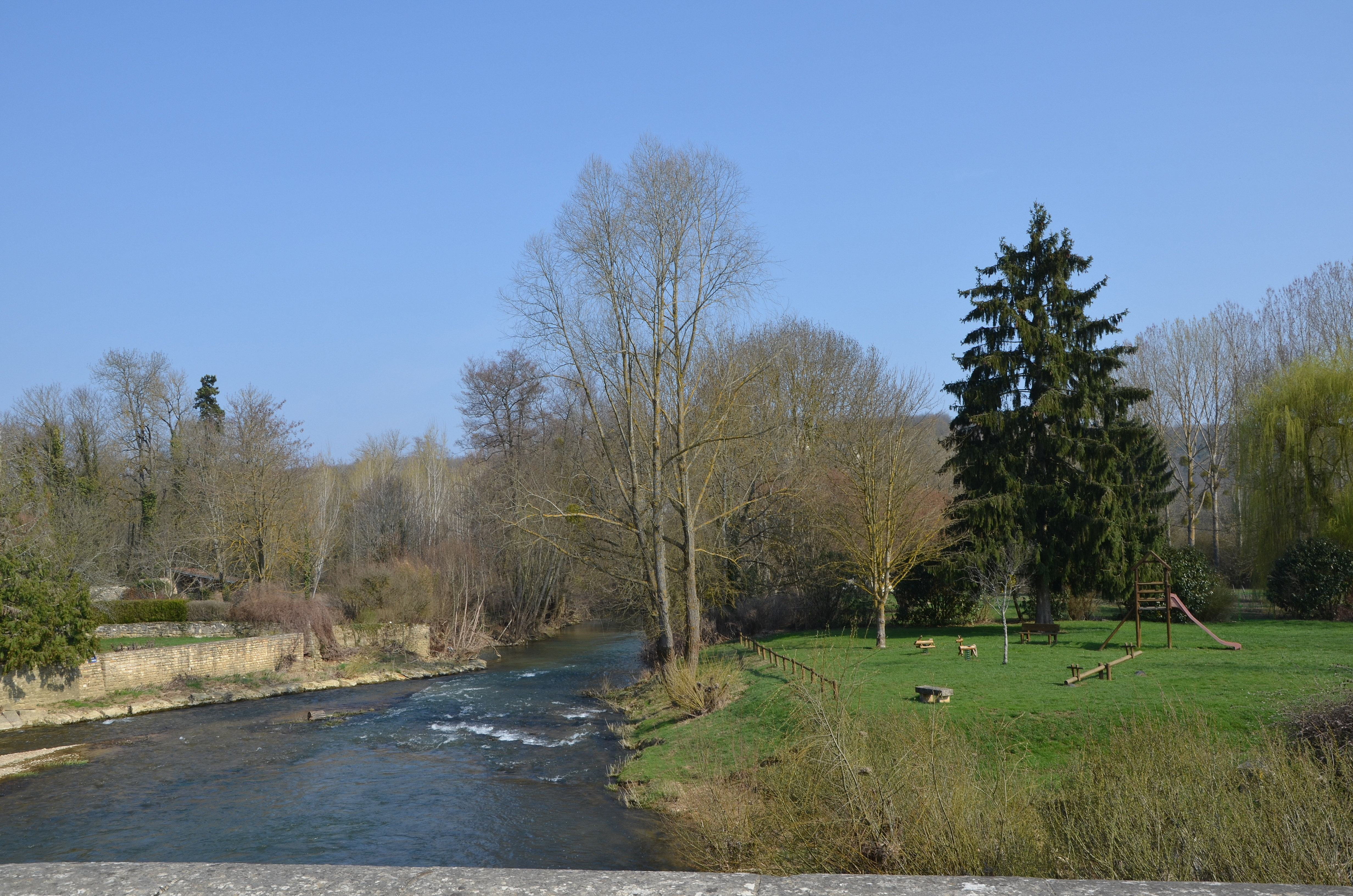 Armançon a Cry , France. Vue depuis le pont Saint-Julien, vers le nord (amont).